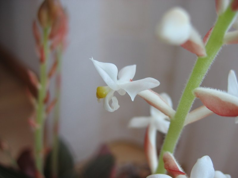 Zimmer-Orchidee Ludisia discolor